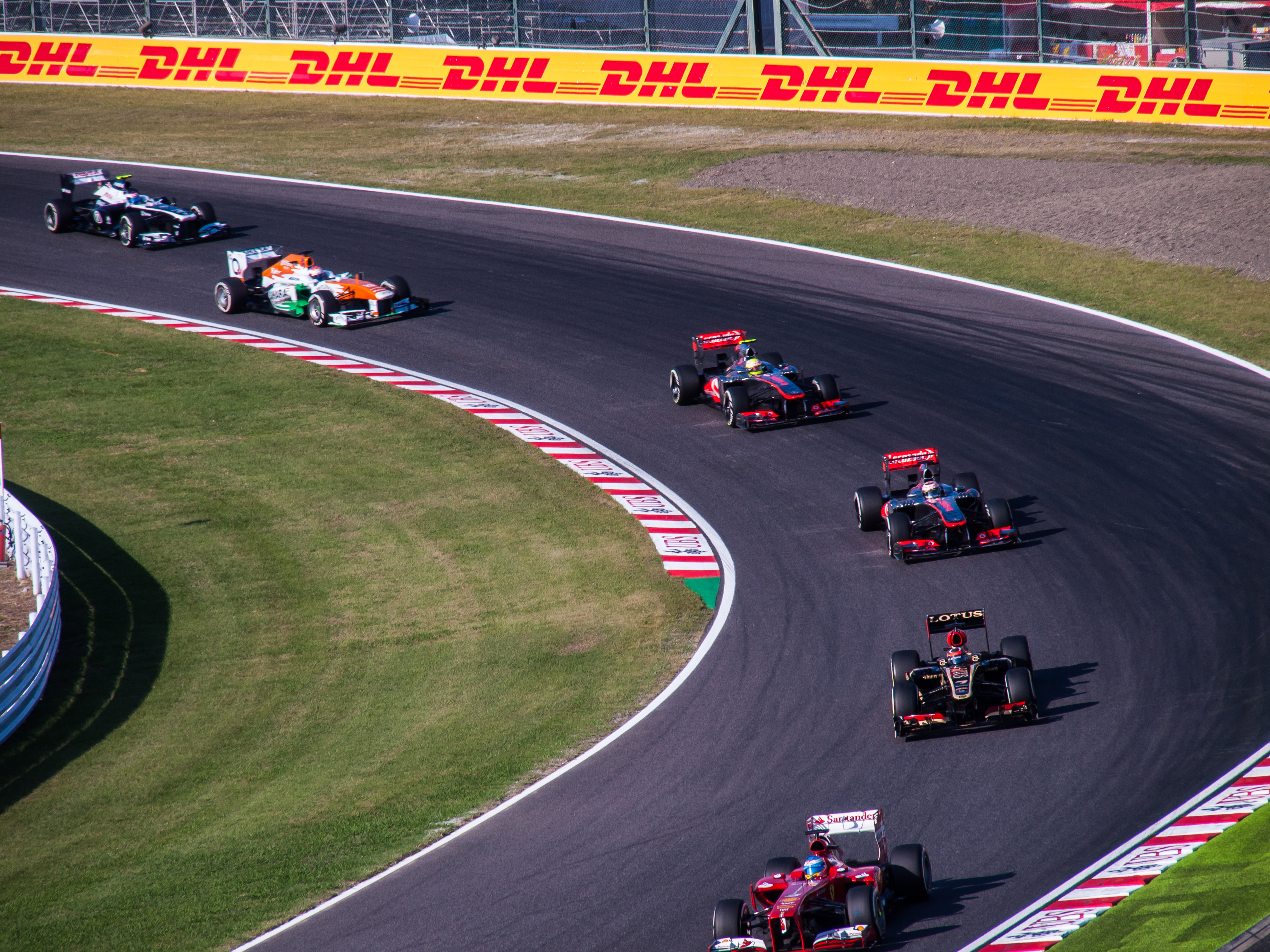 Le peloton à Suzuka en 2013